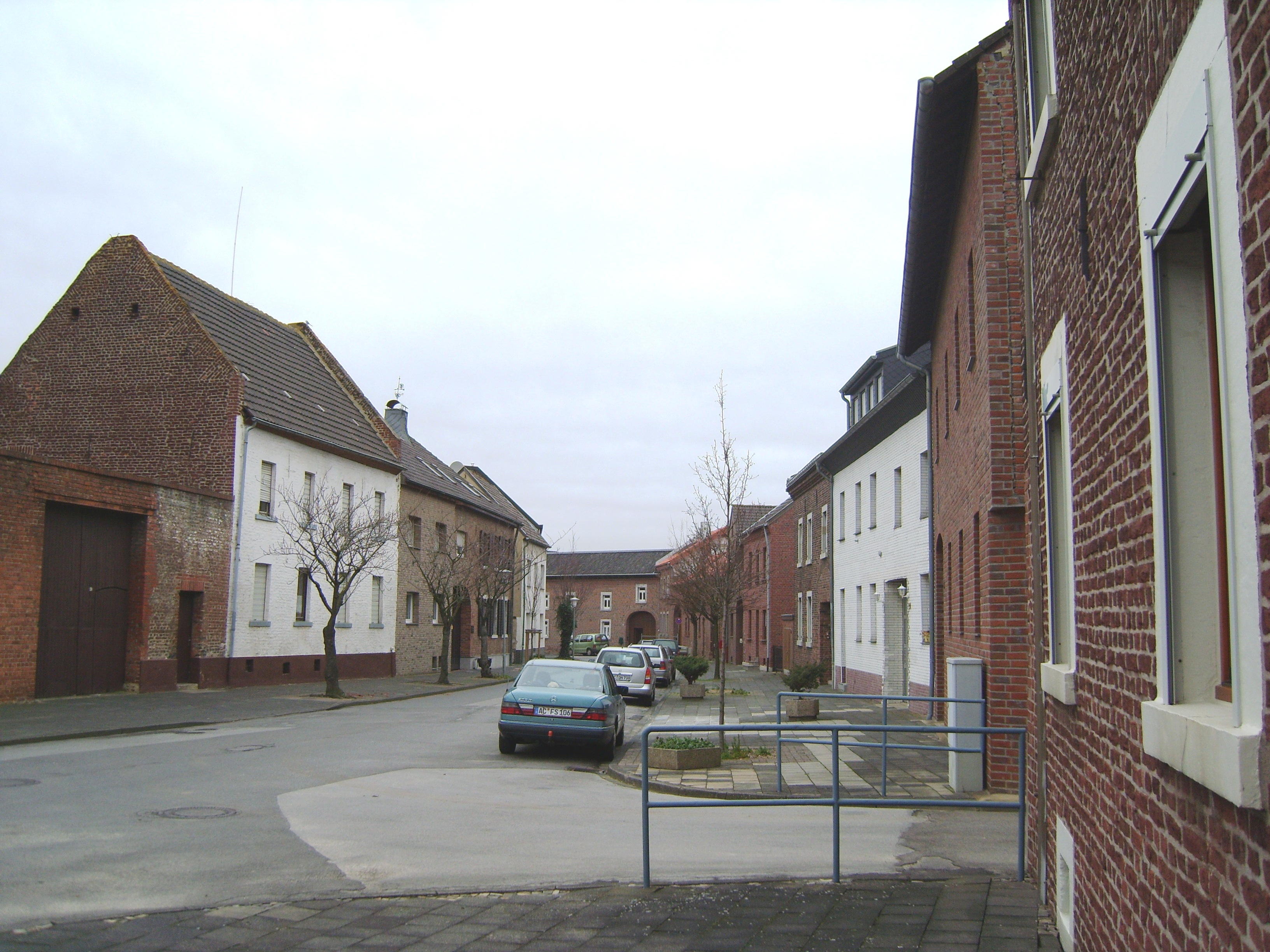 Ortsdurchfahrt von Süden durch den verbliebenen Ostteil von Fronhoven bei Eschweiler in der Städteregion Aachen